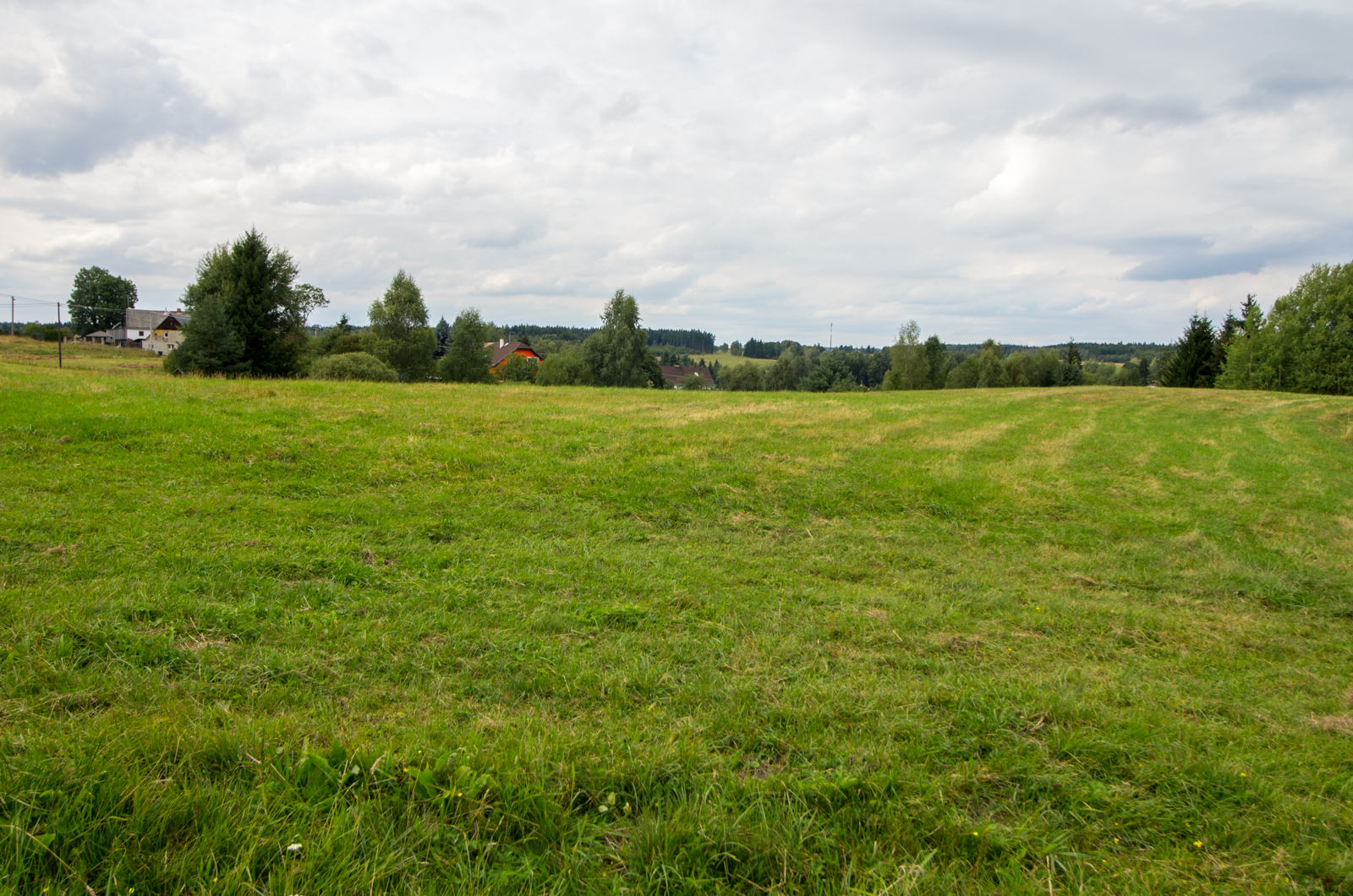 Přírodní památka Hořečková louka na Pile, okres Karlovy Vary